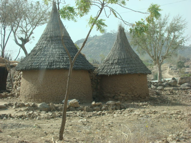 Cases d’habitation à Koza, Mayo-tsanaga, Extrême-Nord